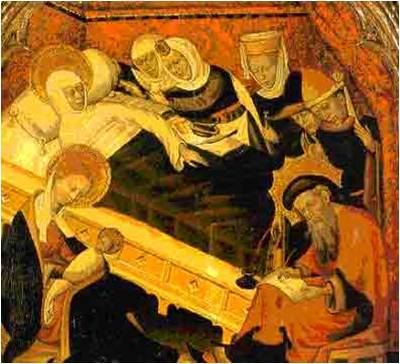 Llit